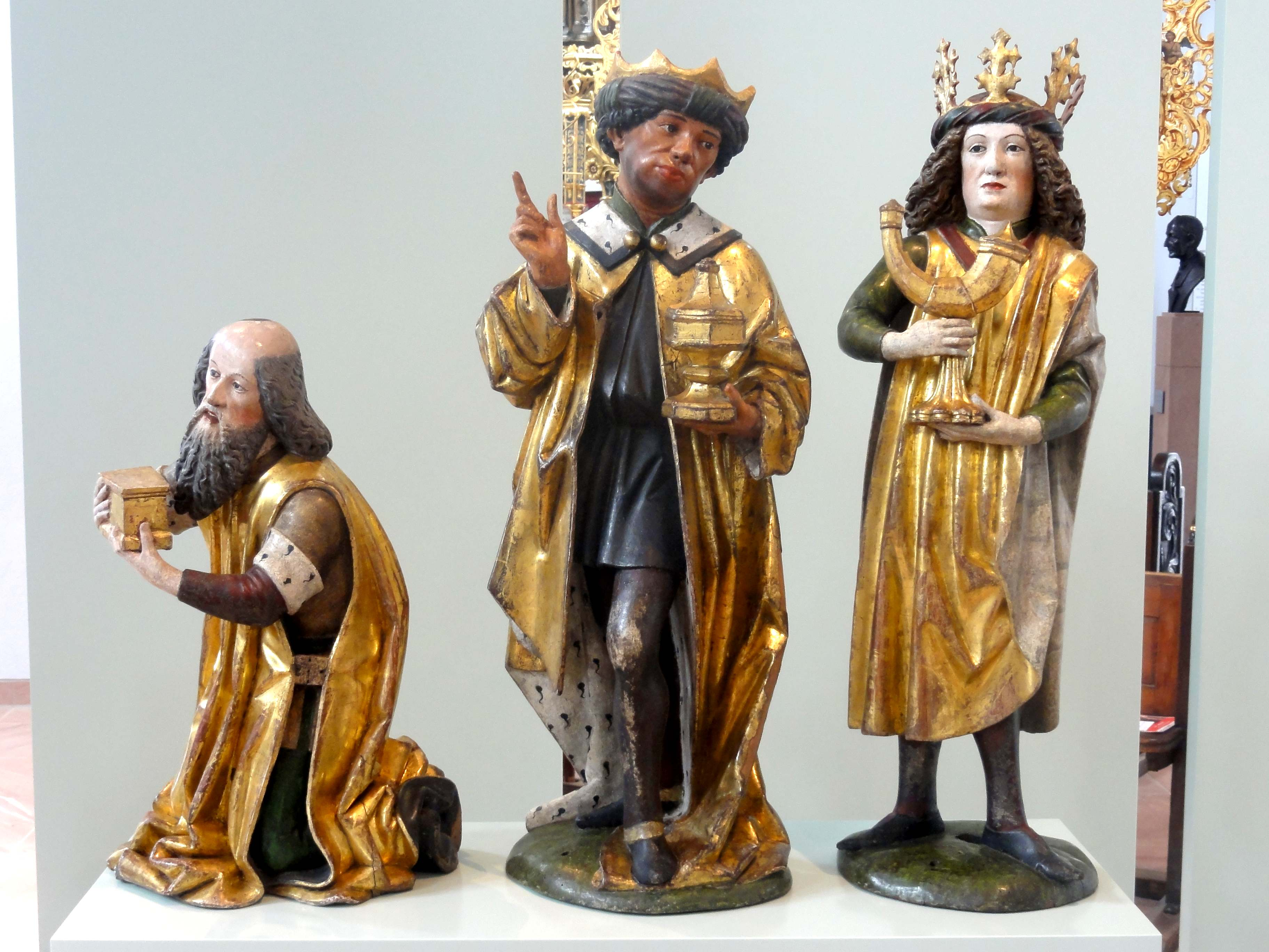 Sammlung Dursch, Dominikanermuseum Rottweil - Objektbeschreibung siehe Dateititel.